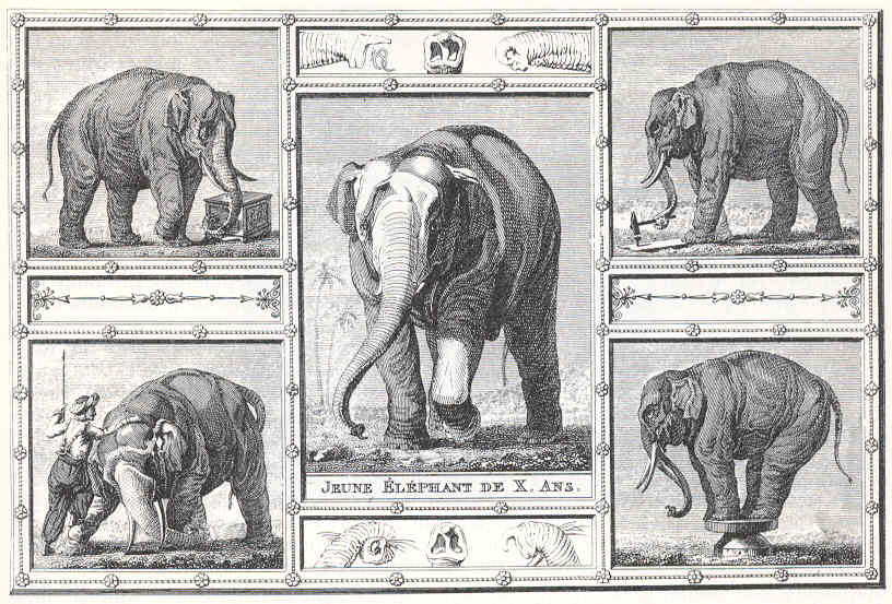 Jeune éléphant de X. ans (Baba)